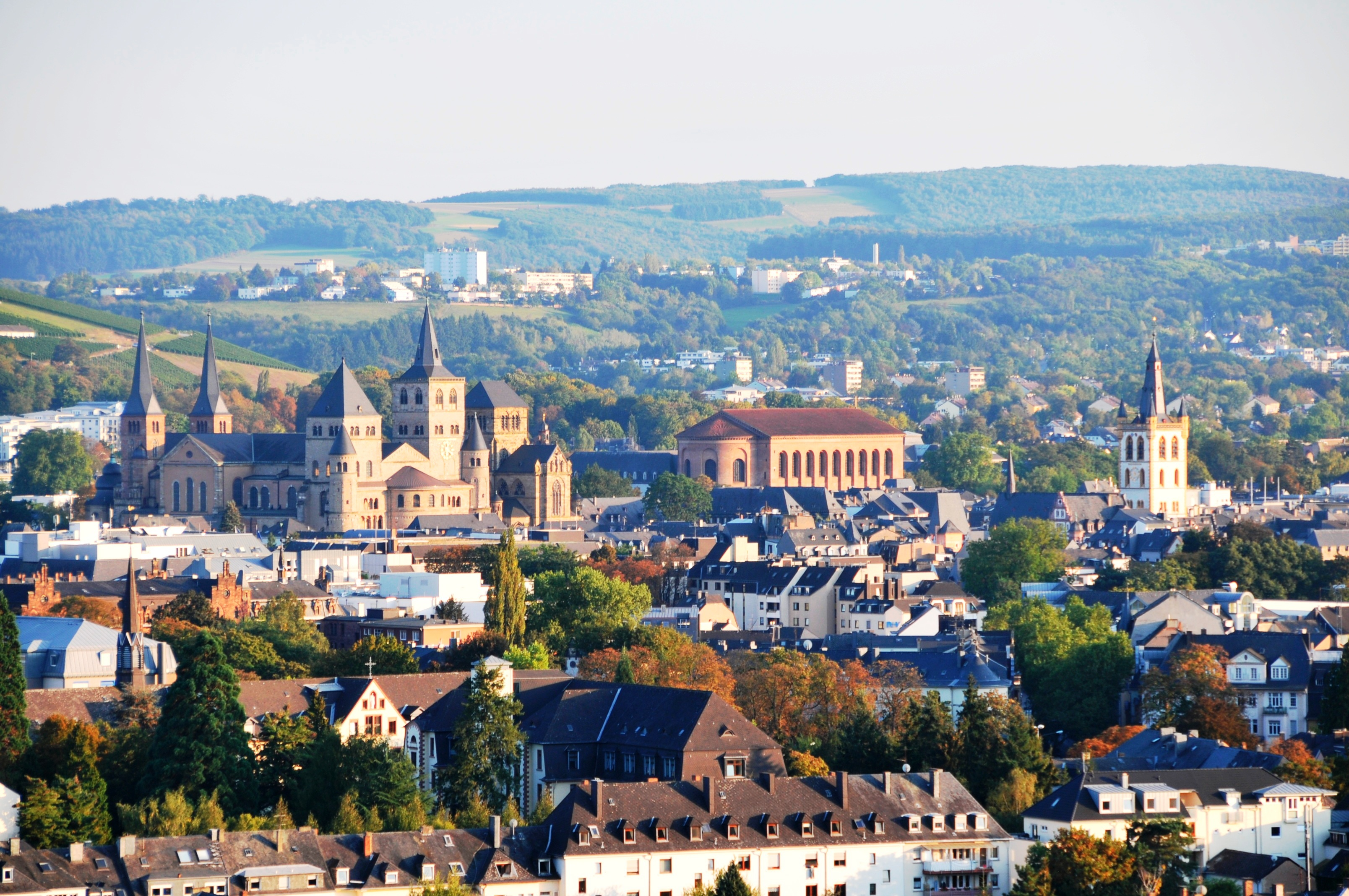 Trier, Blick vom Weisshaus auf die Altstadt